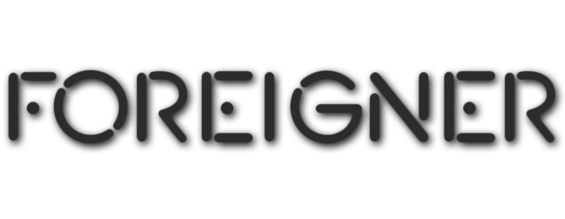 Logo dei Foreigner